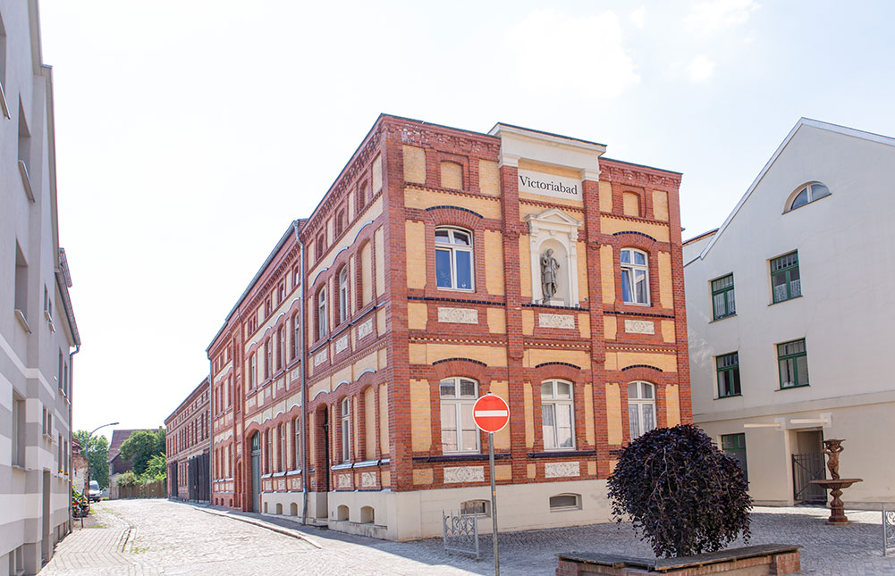 Stendal Mittelstraße 1 bis 3, 1, Victoriabad, 2 und 3 Gewerbehof, Baudenkmale